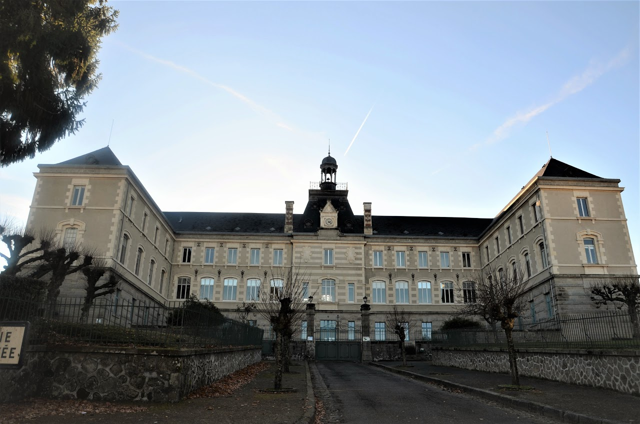 Ecole Normale de Guéret